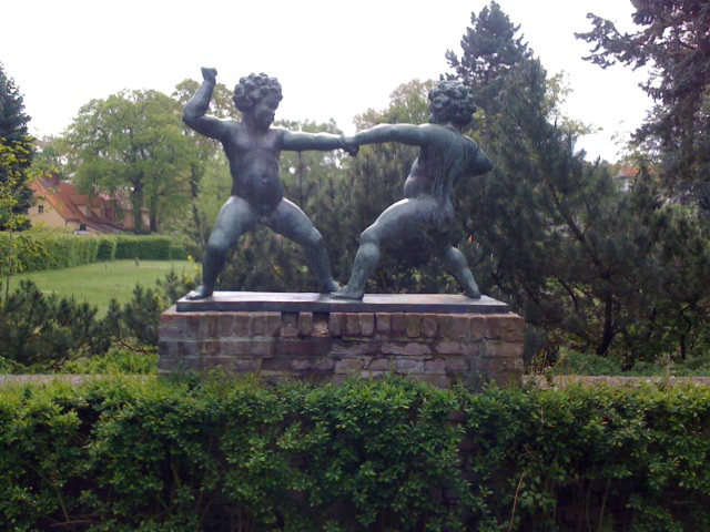 Die Skulptur "Streitende Knaben" des Künstlers Wilhelm von Winterfeld steht in der Siemensstadt im Innenhof der Siedlung zwischen der Rapsstraße und dem Rohrdamm.